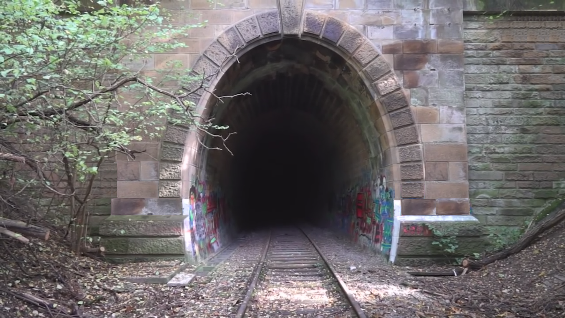 Heilbronn, Lerchenbergtunnel (erbaut 1900)